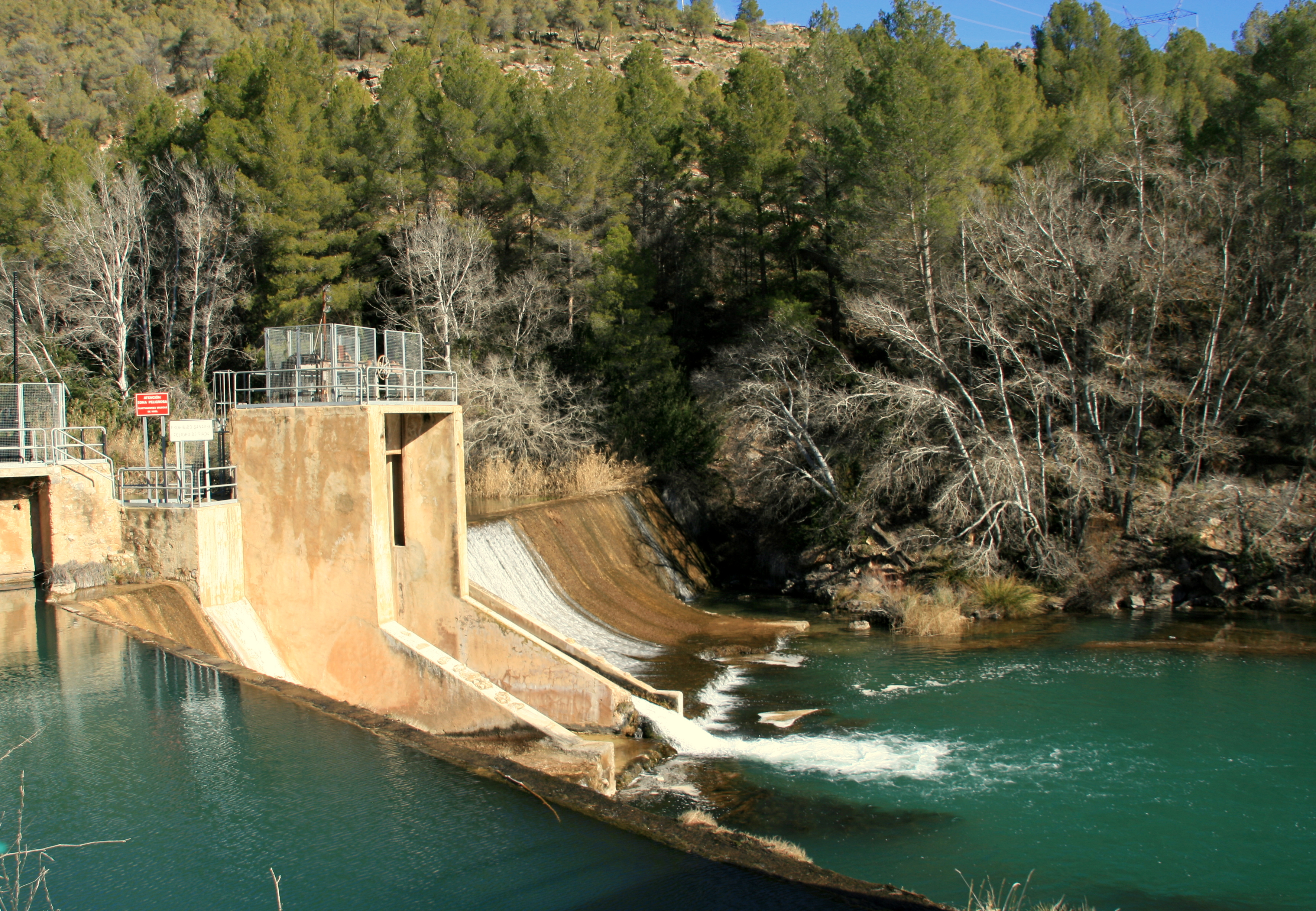 Río Cabriel aguas abajo de la presa de Contreras This is a photography of a Site of Community Importance in Spain with the ID: ES5233010. Natura2000 entry, EEA entry